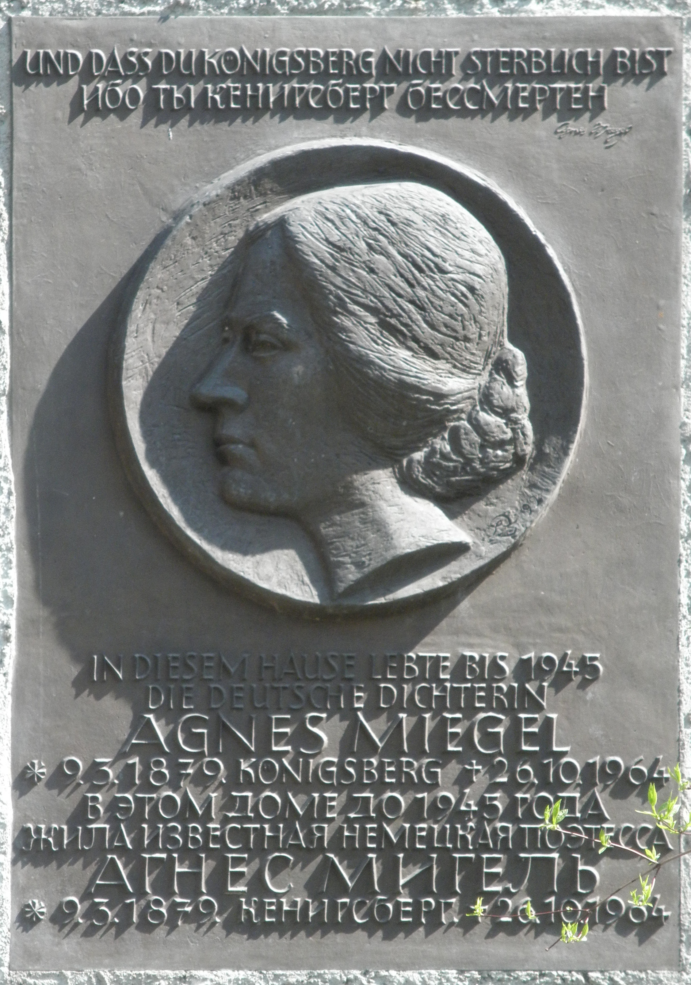 Agnes Miegel Tafel Königsberg